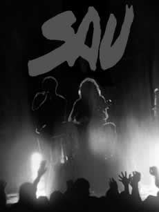 Sau ha esdevingut, al llarg de la seva trajectòria musical, un dels millors grups de pop rock en català de tots els temps. Amb deu discos a les espatlles, Sau es va consolidar com a fenomen de masses oferint centenars de concerts arreu dels Països Catalans i Europa, molts dels quals, multitudinaris i venent milers de discos.